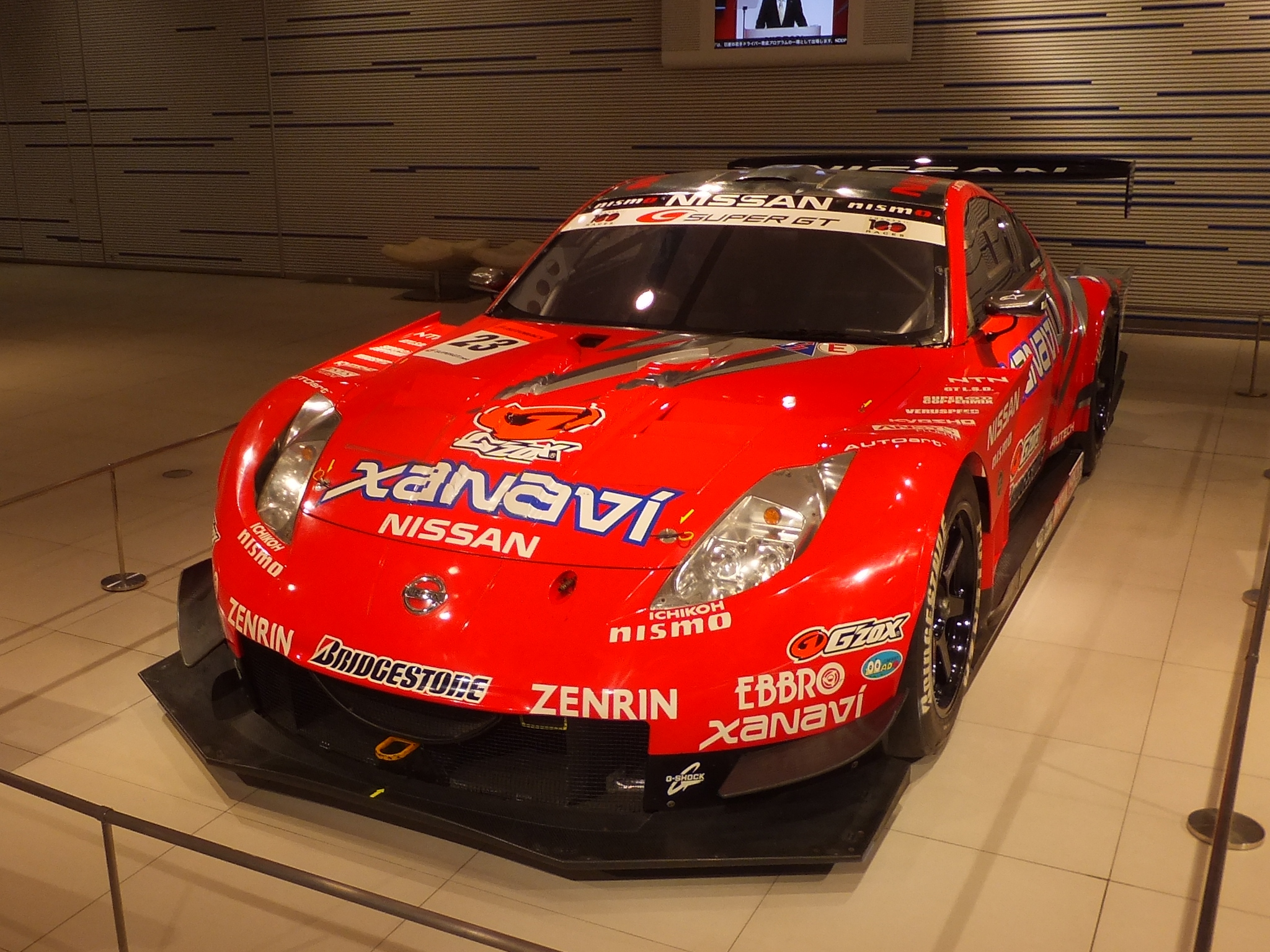 日産 XANAVI Nismo Z、日産グローバルヘッドクォーターズギャラリーにて